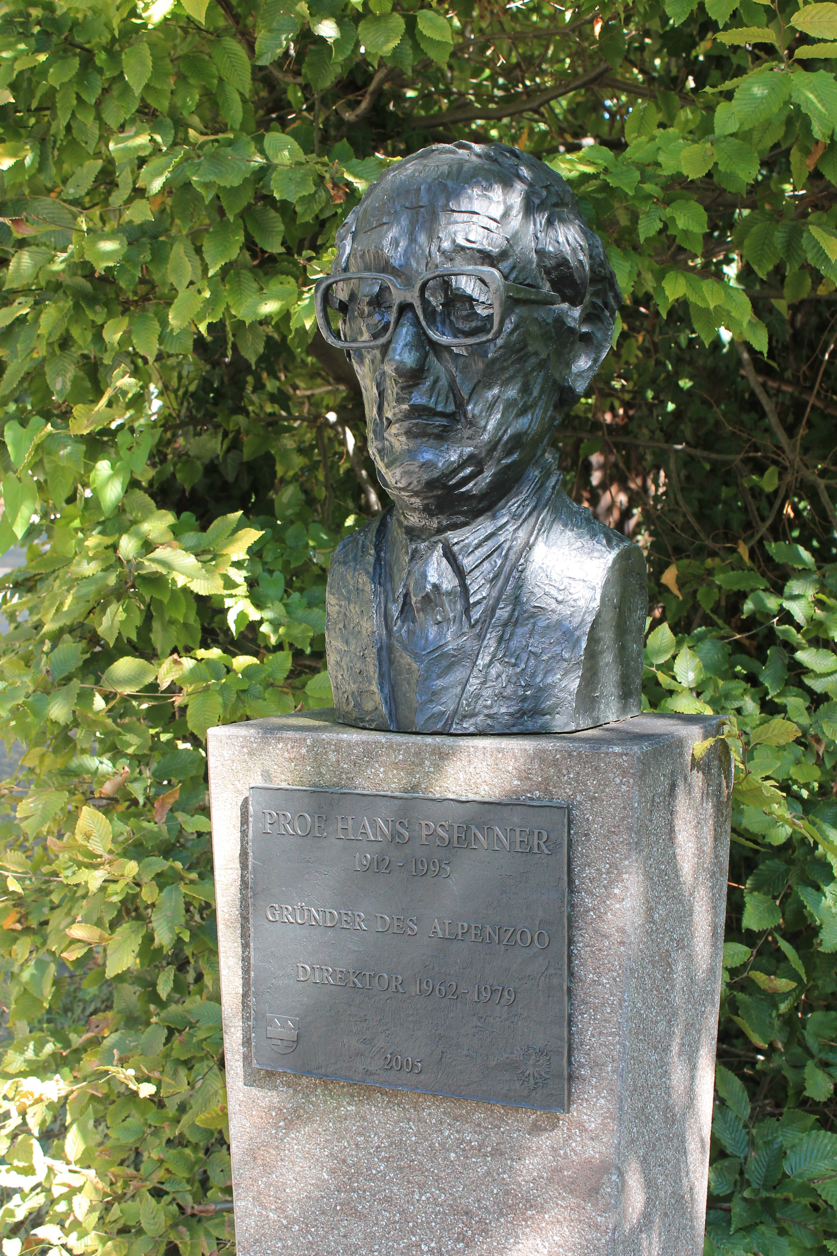 Alpenzoo Innsbruck, Statue von Hans Psenner